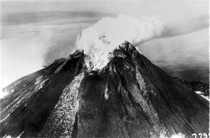 Repronegatief. De uitbarsting van de Merapi